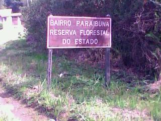 Placa de Transito, na beira da Rodovia Vice-Prefeito Salvador Pacetti (SP-171), informando a entrada do Bairro Paraibuna, no município de Cunha (SP), onde há uma Reserva Florestal do Estado de São Paulo.